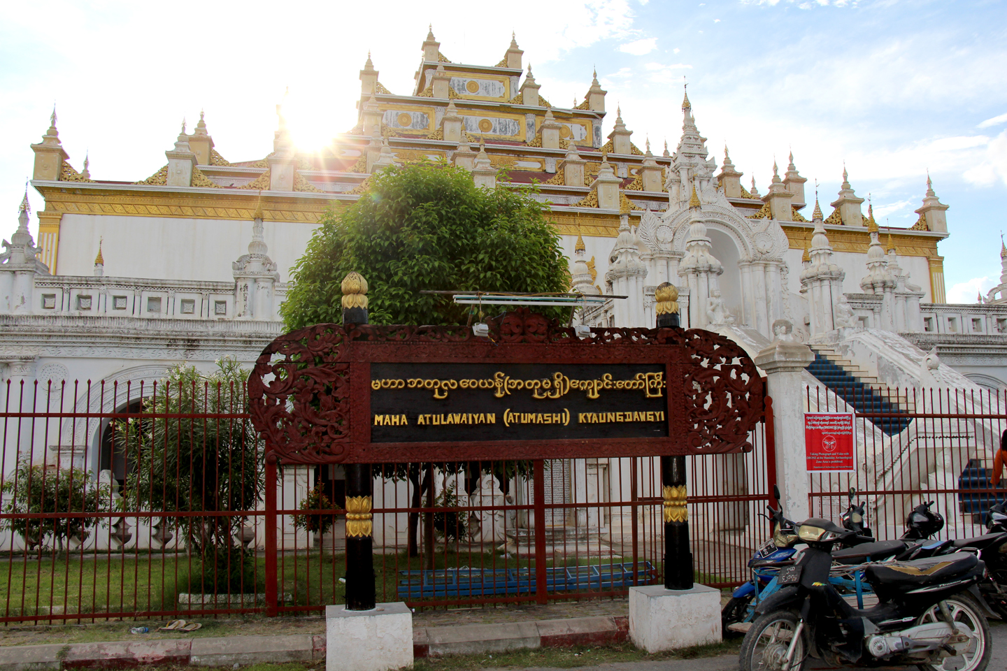 မြန်မာဘာသာ: မဟာအတုလဝေယန်ကျောင်းတော်ကြီး (မန္တလေးမြို့)